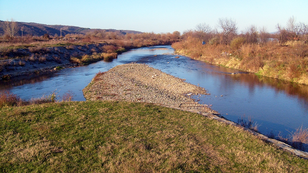 Confluence of Svrljiski and Trgoviski Timok